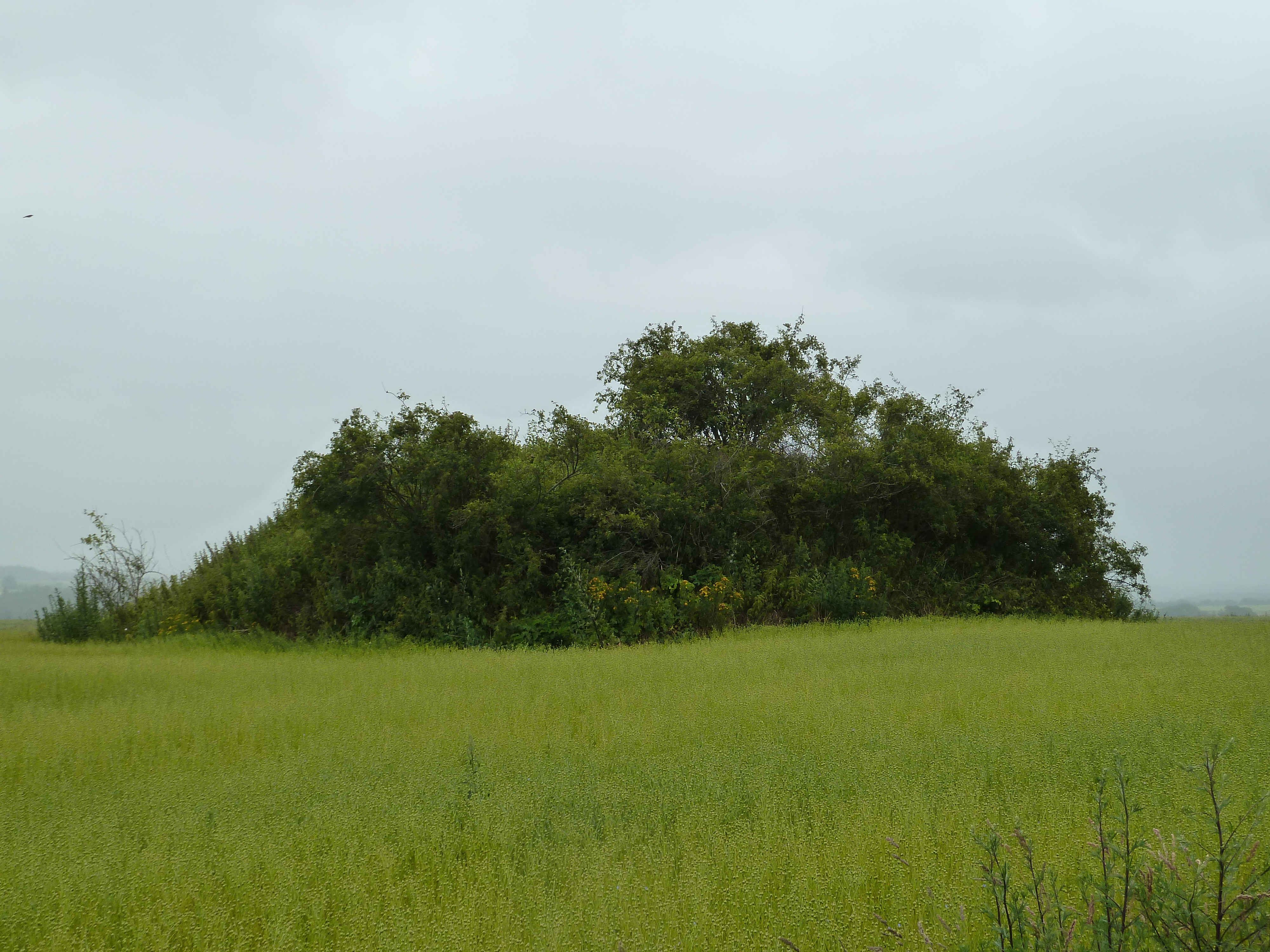 Tombe d'Yve, Braives, Belgique